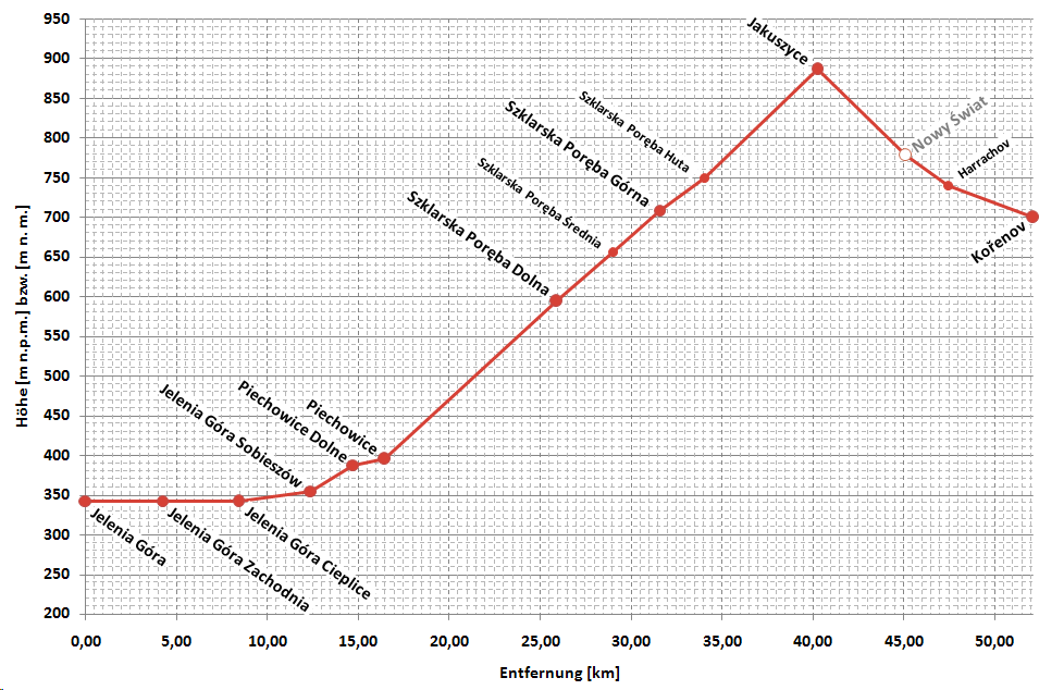 vereinfachtes Höhenprofil der Bahnstrecke Góra-Kořenov ("Zackenbahn")